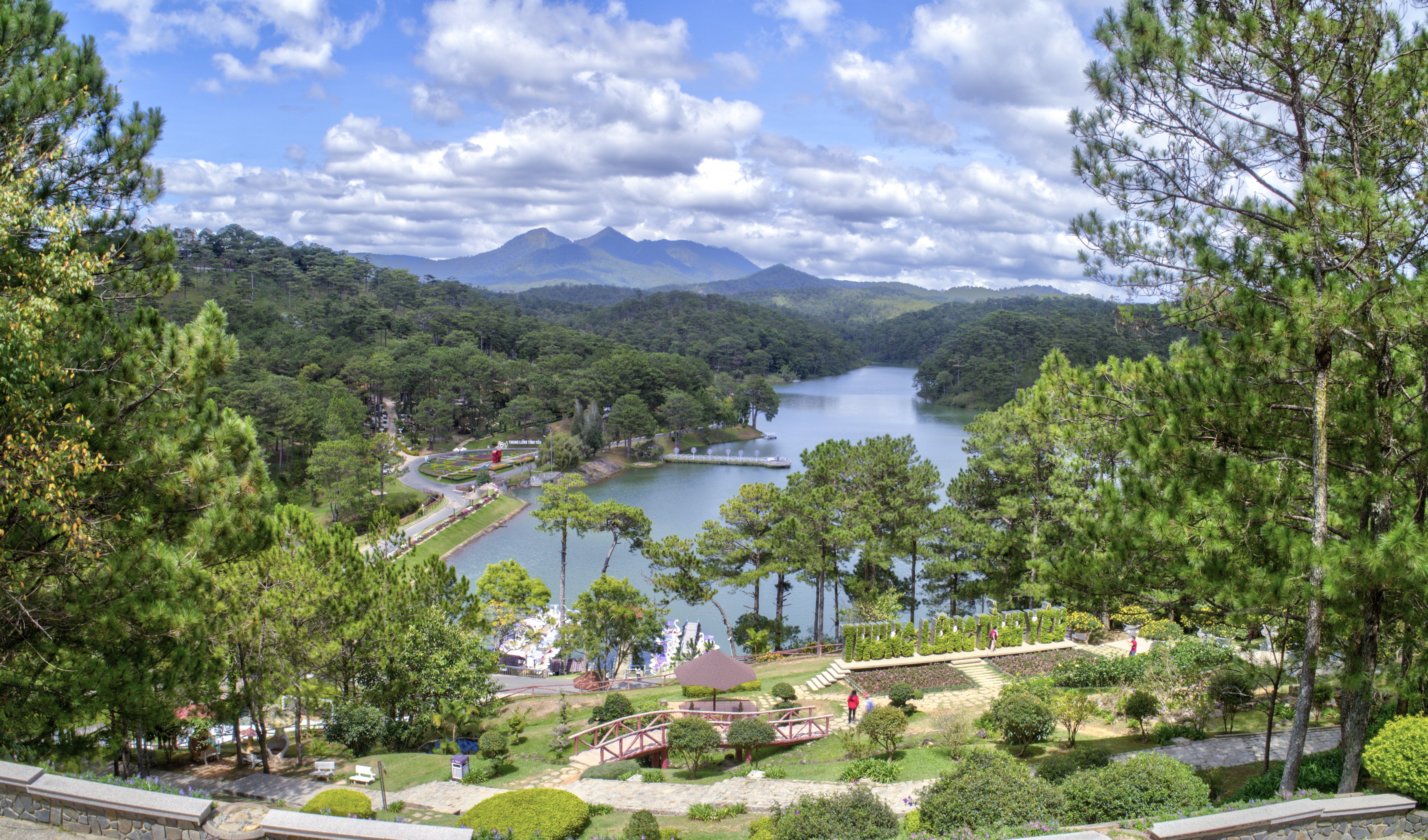 TTC World - Thung lũng Tình yêu: Nơi ước đến, chốn mong về